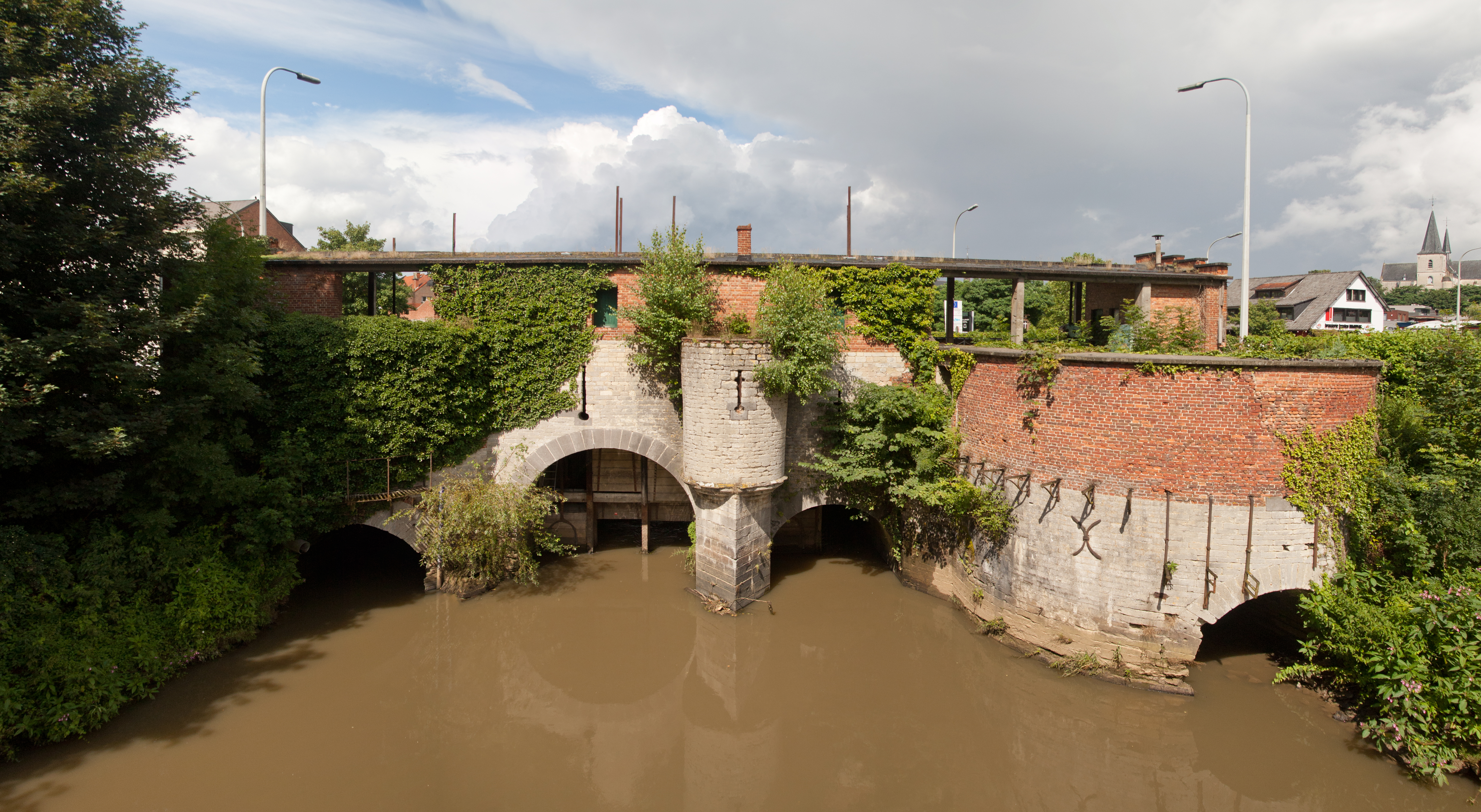 De vervallen onderbouw van de Grote Spuye. Een van de laatste resten van de 2e stadsomwalling van Leuven